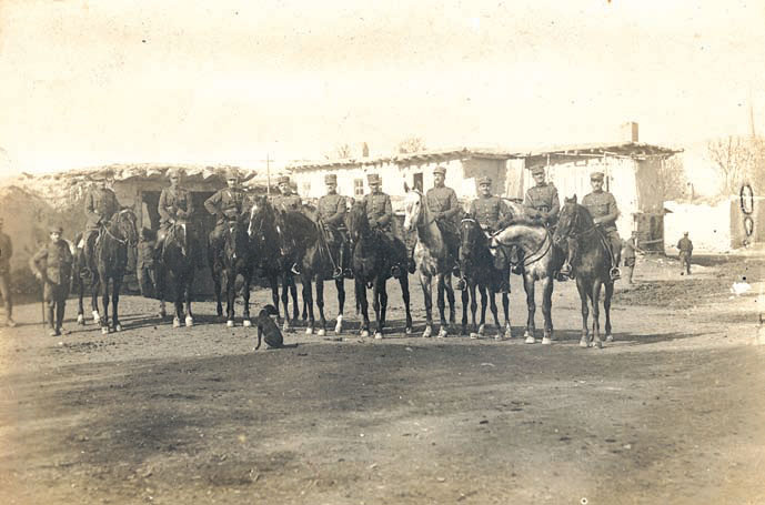 Το Στρατηγείο της Ανεξάρτητης Μεραρχίας στο χωριό ΜουταλίμπTürkçe: Batı Cephesi'nde Yunan Bağımsız Bölüğü'nün subayları